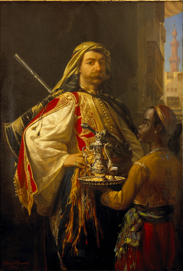 Le Baron Lycklama